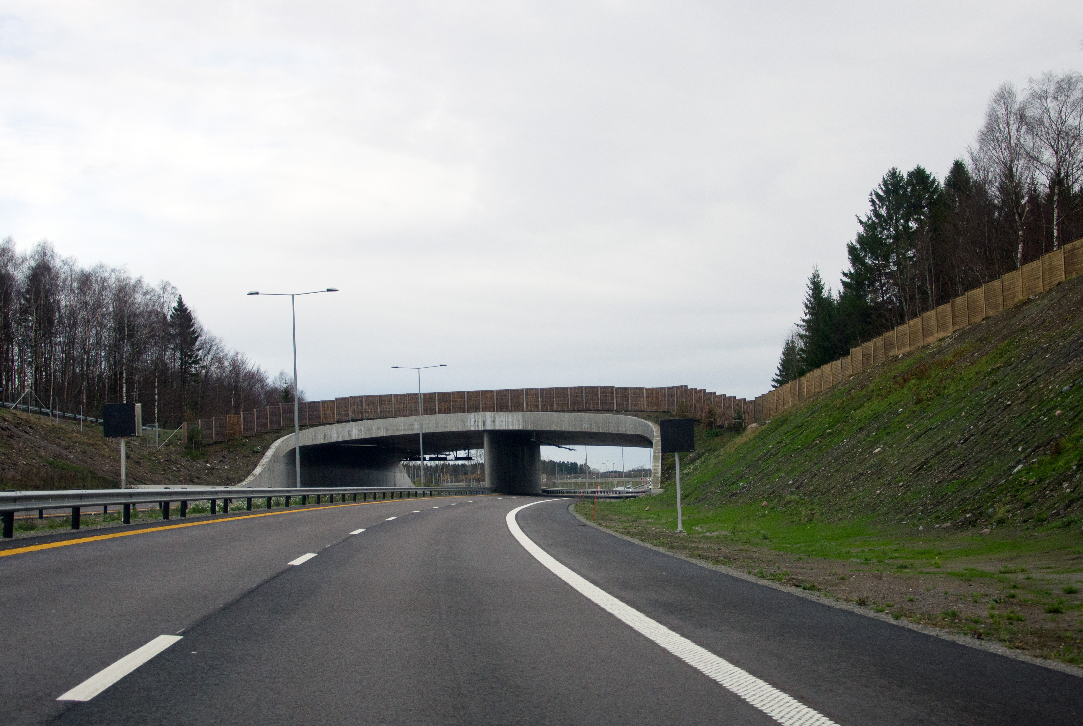 Tassebekk viltlokk på E18 i Vestfold